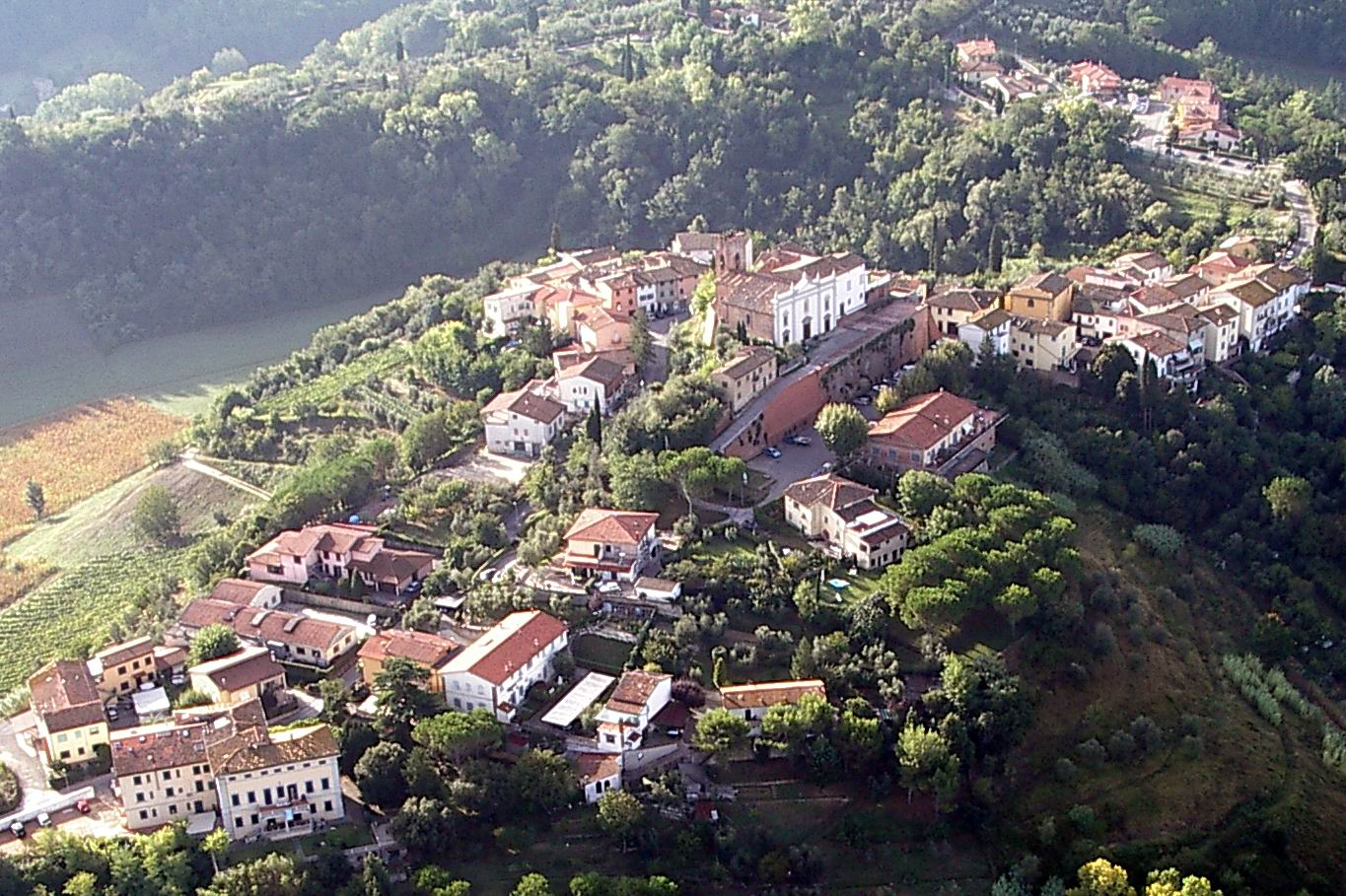 Vista di Cigoli dall'alto